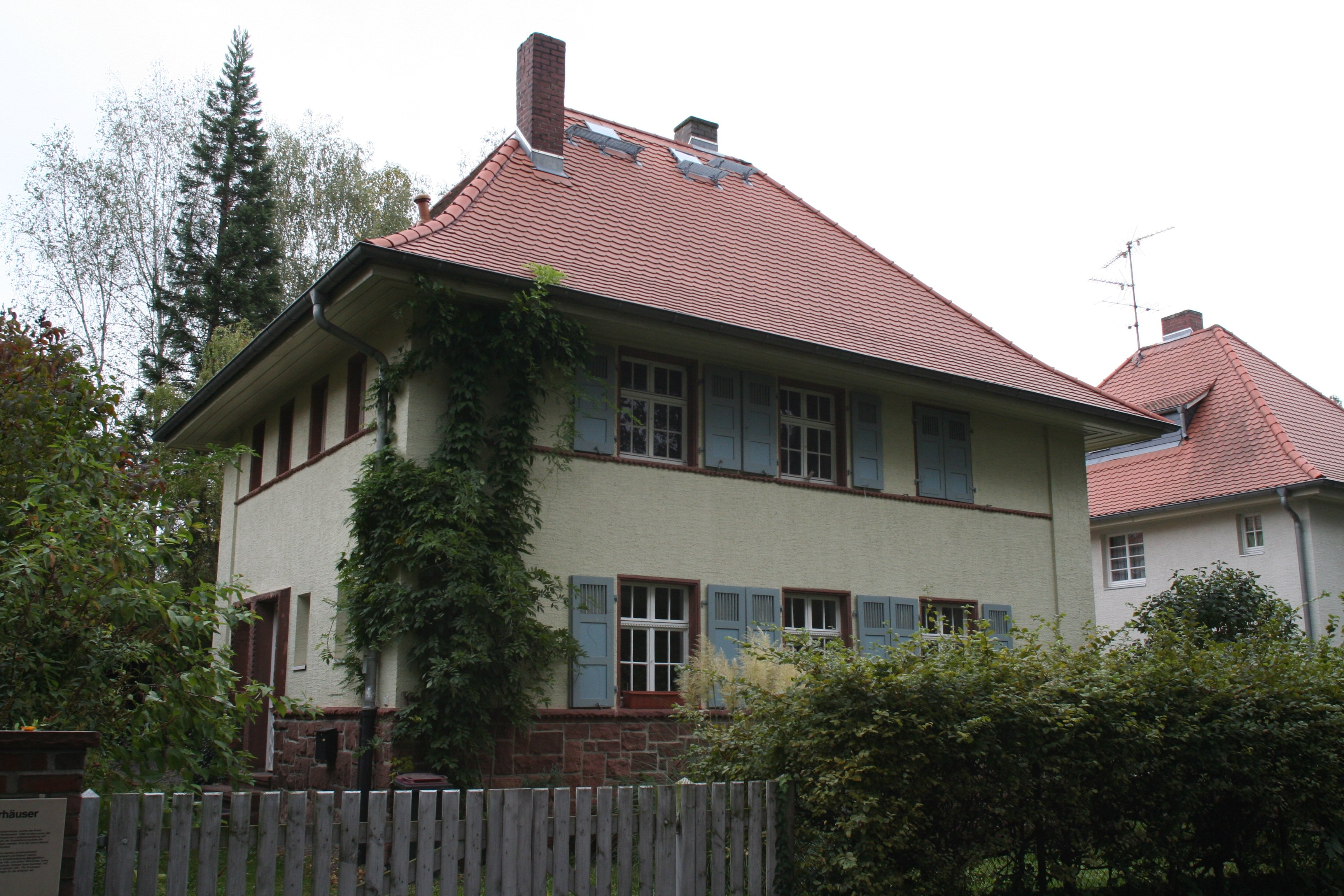 Arbeiterhaus von Metzendorf in der Erbacherstrasse, Darmstadt (Germany)